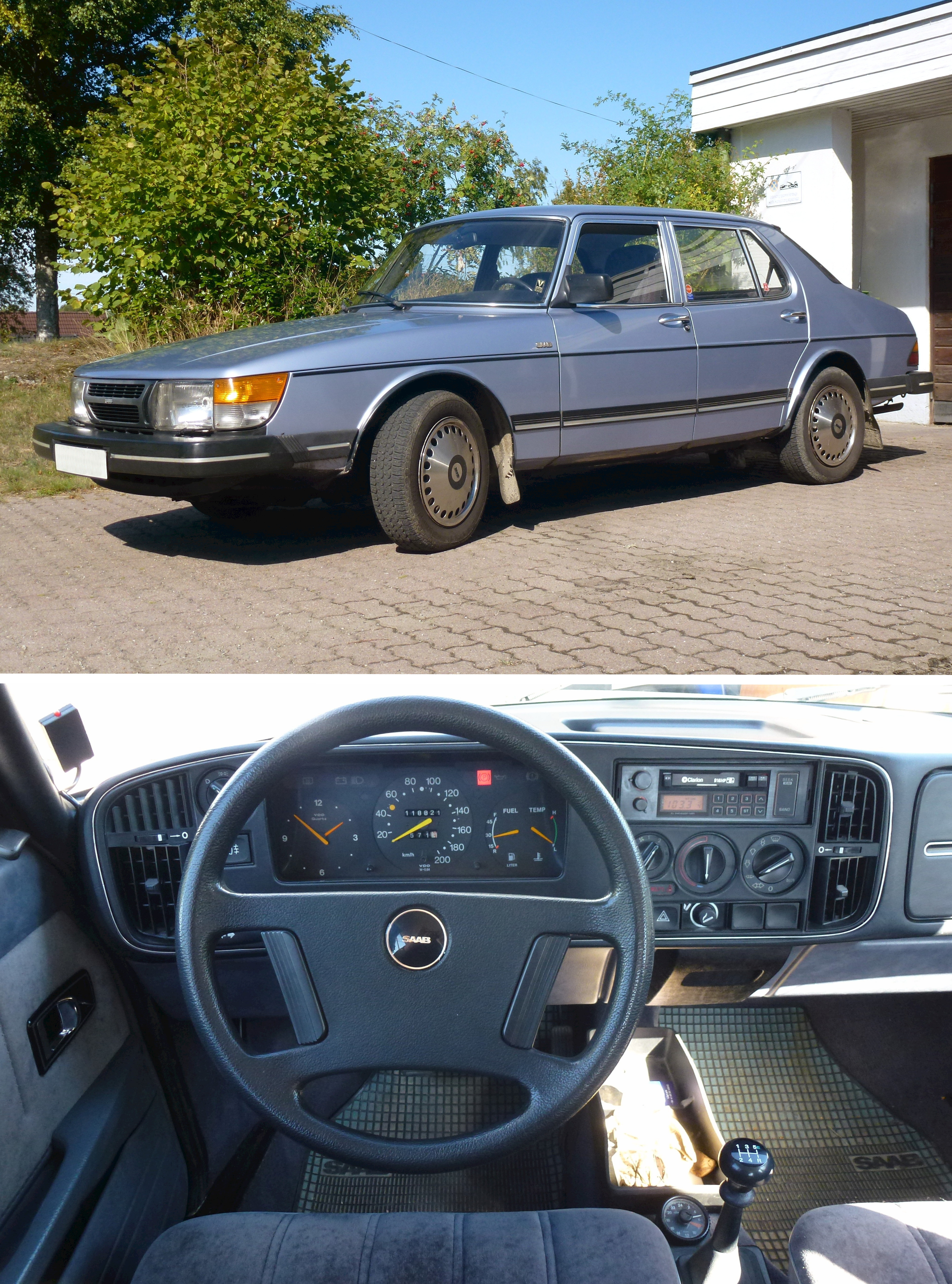 SAAB 900 GL 1984, collage